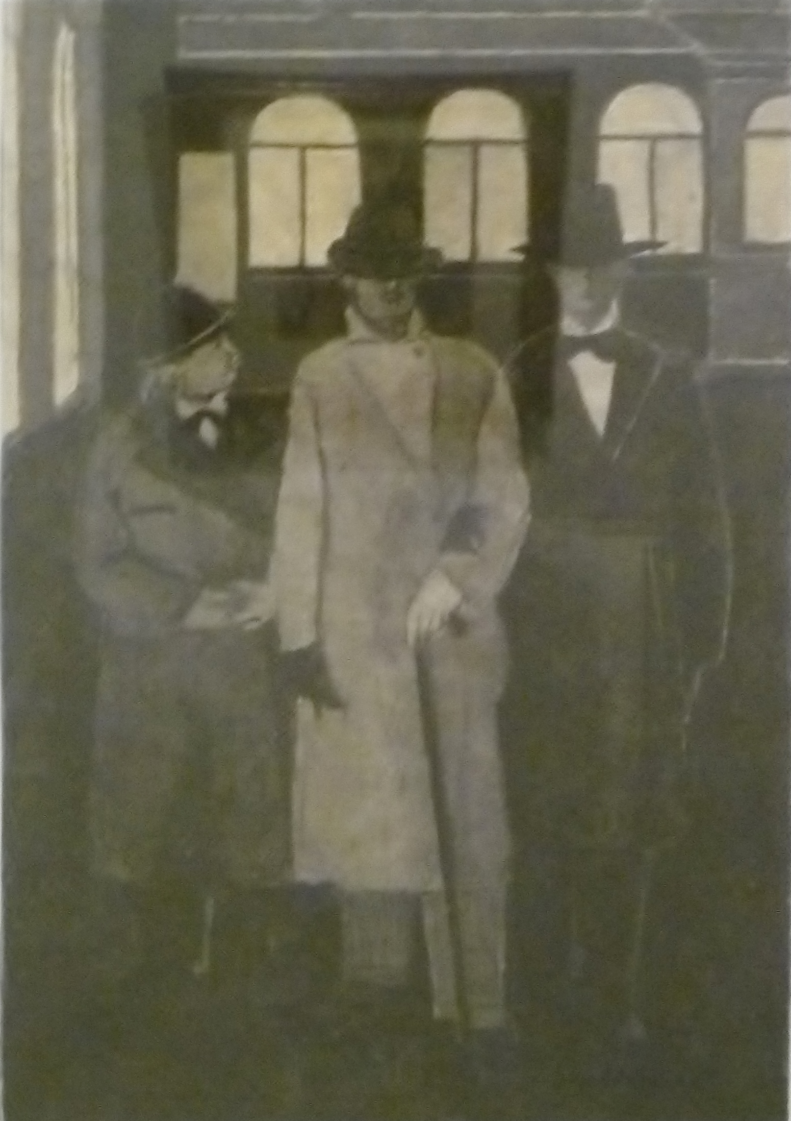 "Passanten in een gaanderij", tekening door Léon Spilliaert (1941), geïnspireerd op "La Servante au miroir" (Marcel Lecomte); potlood, gewassen Oost-Indische inkt, pen, aquarel op papier (319 x 189 mm); privéverzameling